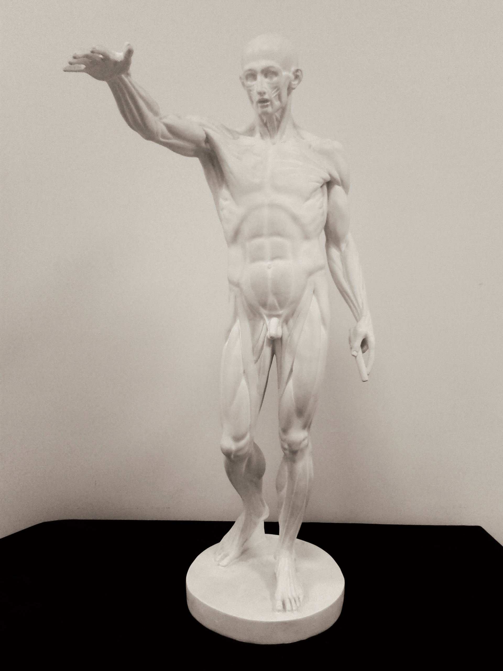 Ecorché Houdon vu de face